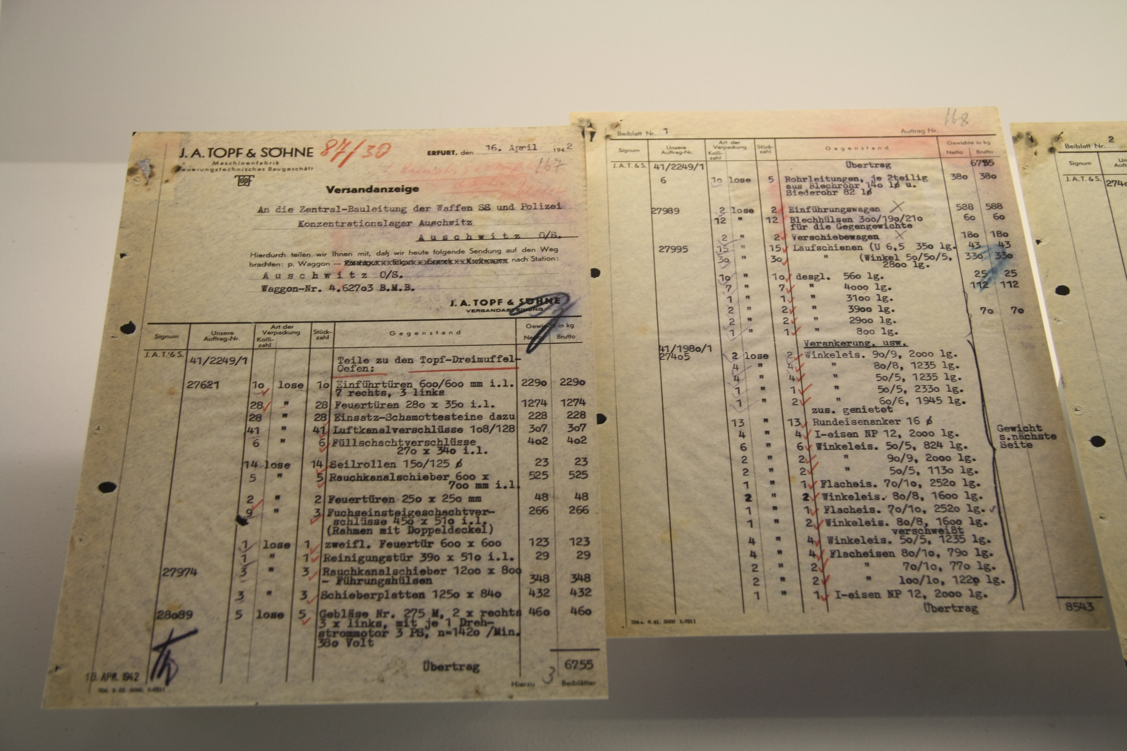 Eine Versandanzeige vom 16. April 1942 für Einzelteile, die für den Bau eines Verbrennungsofen in Auschwitz benötigt wurden. Die Lieferung erfolgte auf dem Schienenweg.